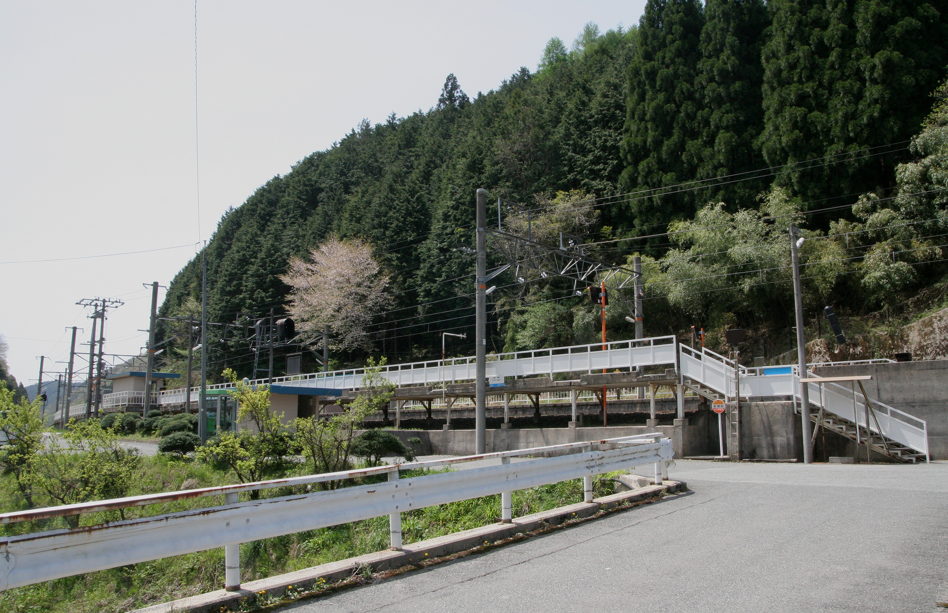 新郷駅の駅舎